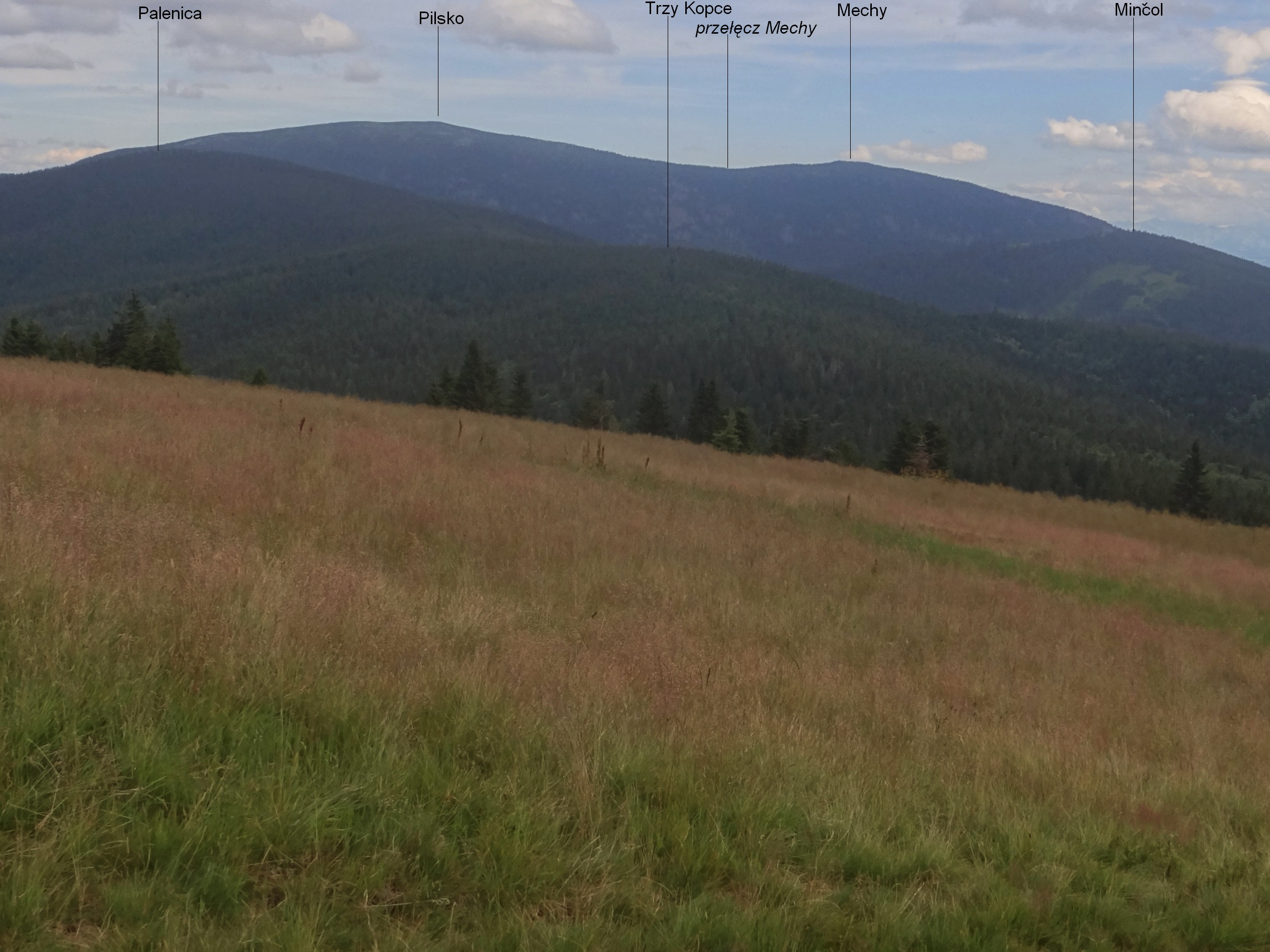 Widok na Pilsko z Hali Rysianka